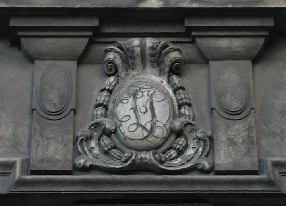 Die Initialen der ersten Besitzer am Haupt-Produktionsgebäude des ehemaligen VEB Fortschritt Herrenbekleidung